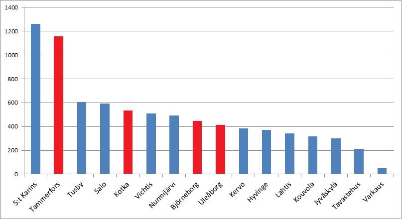 Antal svenskspråkiga i de svenska språköarna i Finland (Absoluta tal). Källa: Svenska språköar och finska utskär (Magma-studie 3/2013) De så kallade traditionella språköarna har markerats i röd färg.